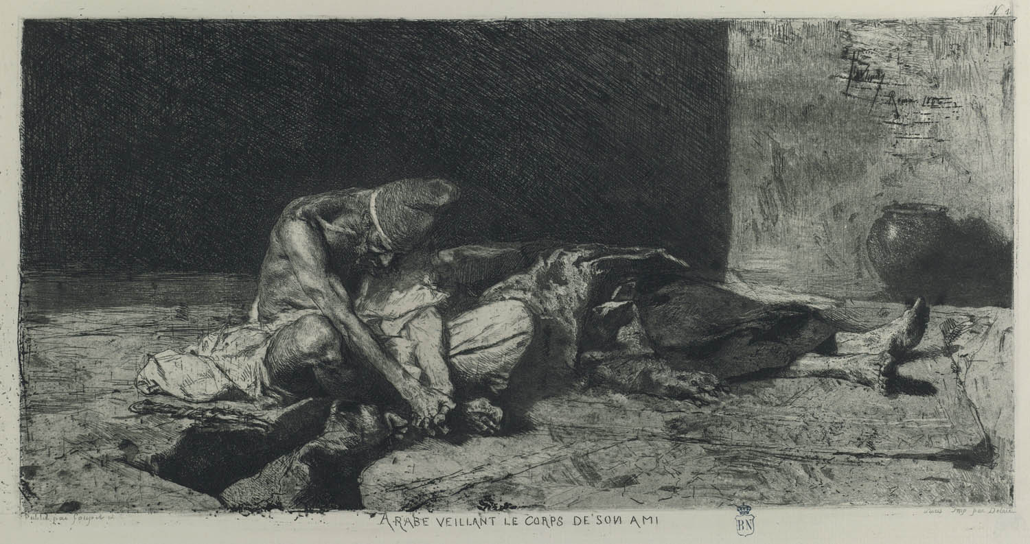 Árabe velando el cadáver de su amigo. Aguafuerte y aguatinta 21,6 x 41 cm Biblioteca Nacional Madrid Publicado en 1878 por Goupil y Cia. en París.